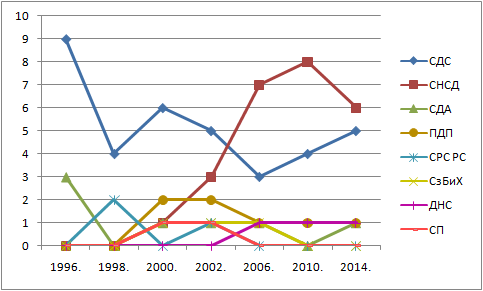 Расподјела мандата за Представнички дом Парламентарне скупштине БиХ из Републике Српске